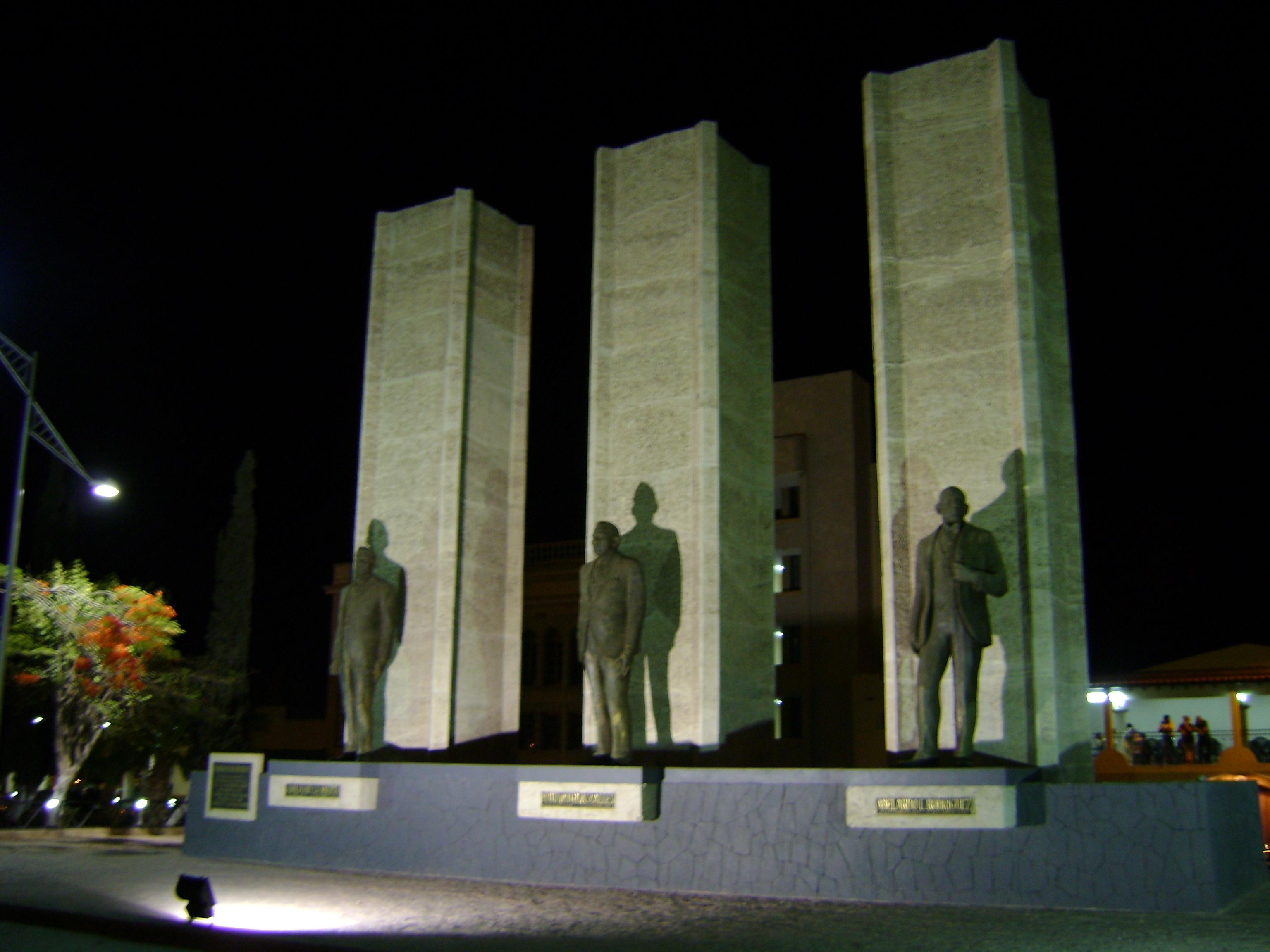 Monumento a los tres presidentes nativos de Guaymas México.